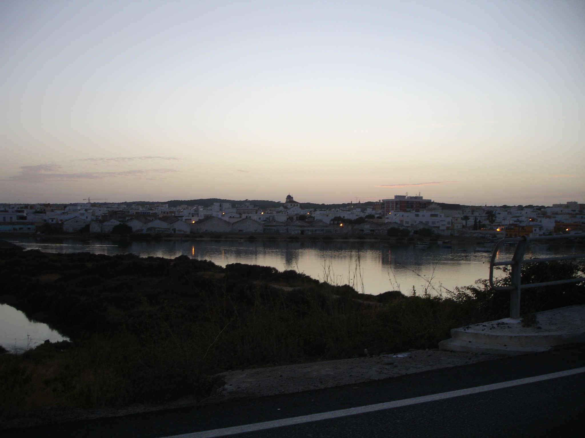 Barbate